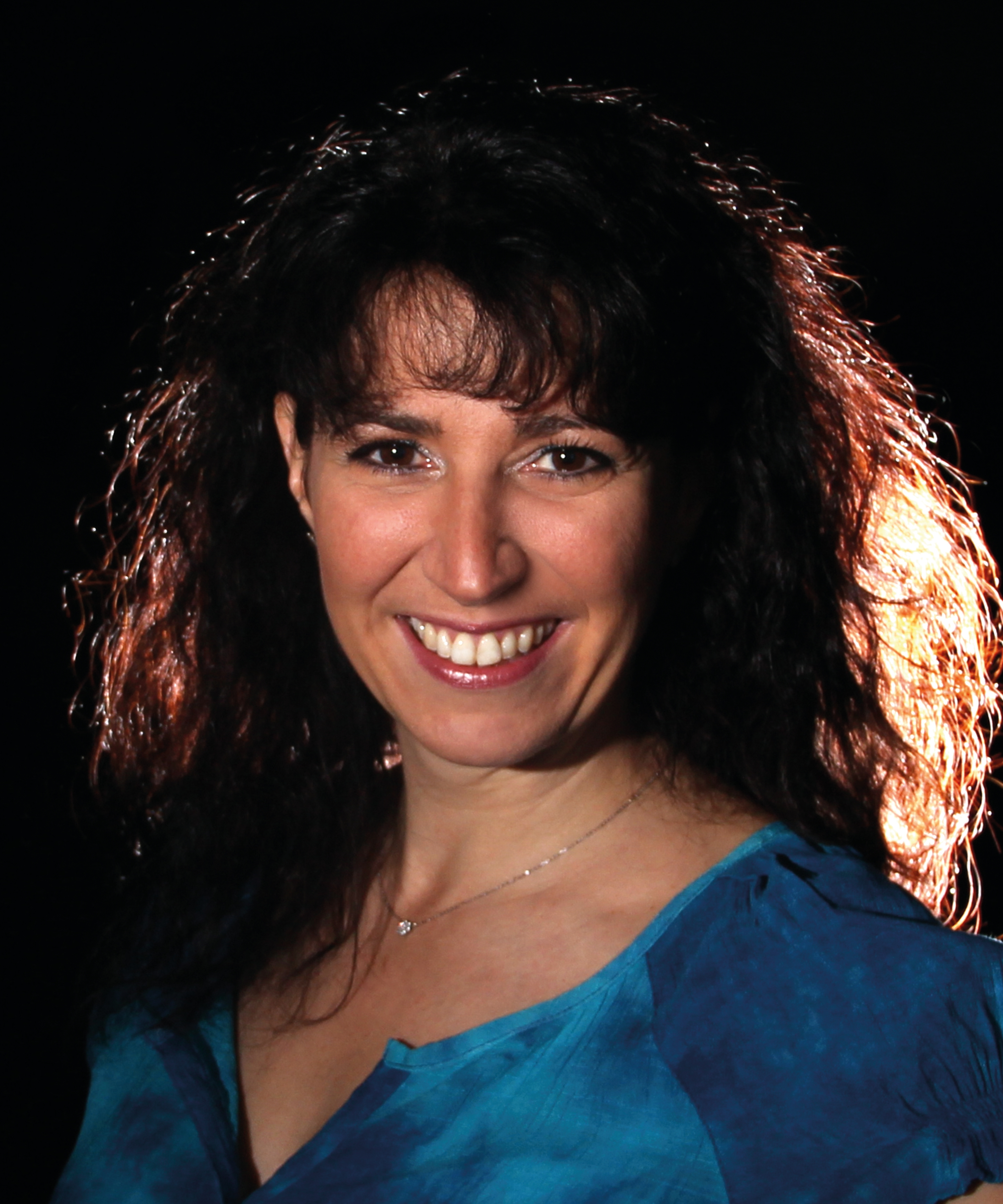 Irène Straub 2014